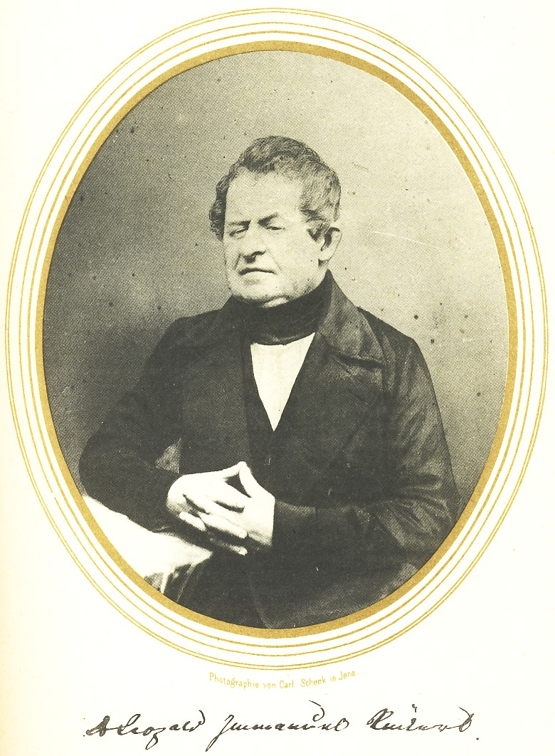 Porträt des Theologen Leopold Immanuel Rückert; Fotografie von Carl Schenk (1813–1874)